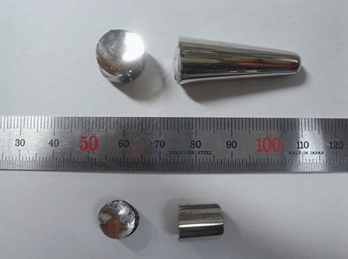 Bulk metallic glass sample